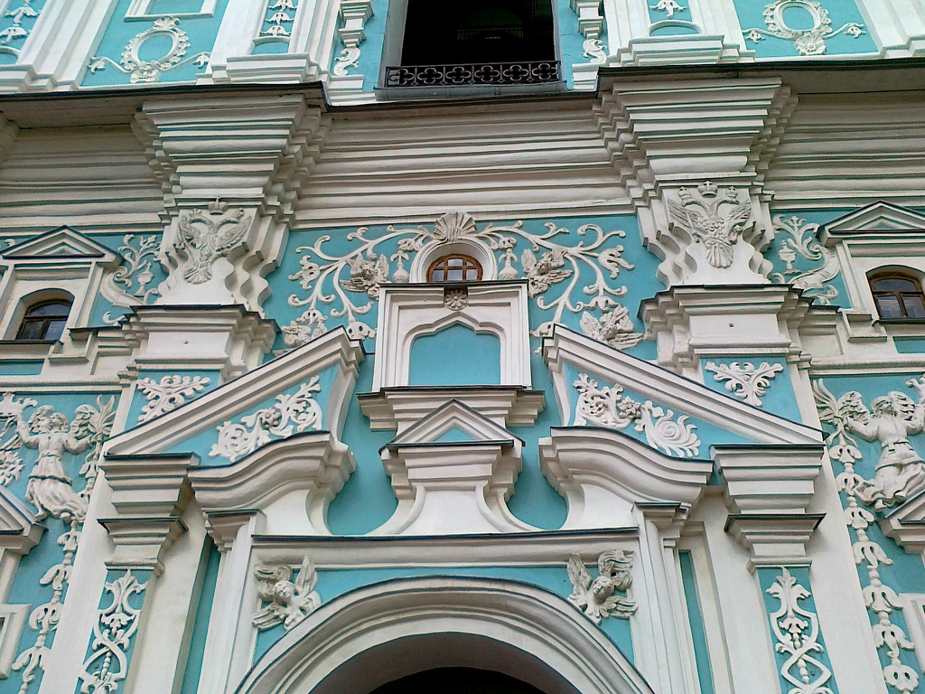 Комплекс Національного заповідника «Софія Київська», Київ, Володимирська вул., 24